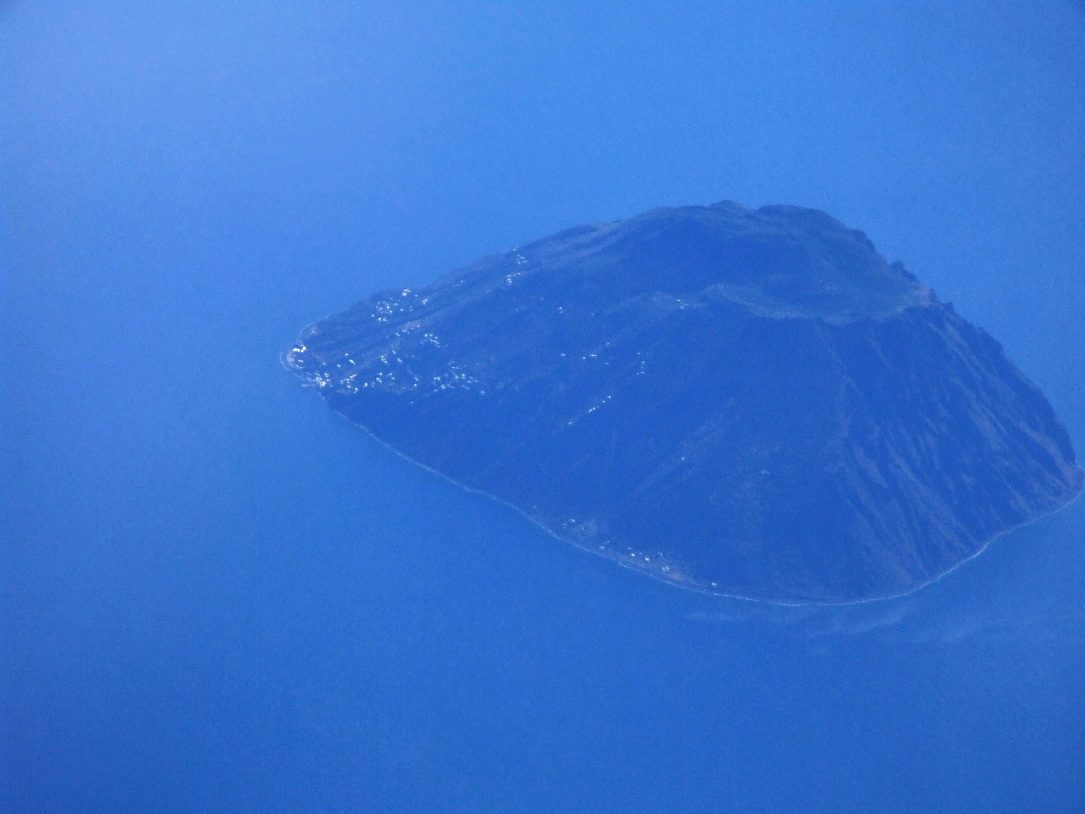 Isola Alicudi